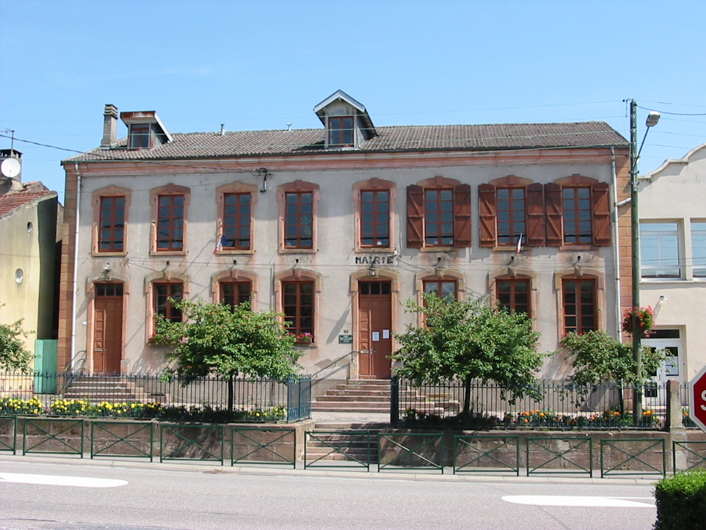 Mairie de Bertrichamps (Meurthe-et-Moselle)